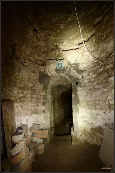 Пещеры Бузулукского Спасо-Преображенского монастыря. Проход из ствола монастыря в пещеры. По периметру ствола видны места, где были установлены ступени винтовой лестницы.